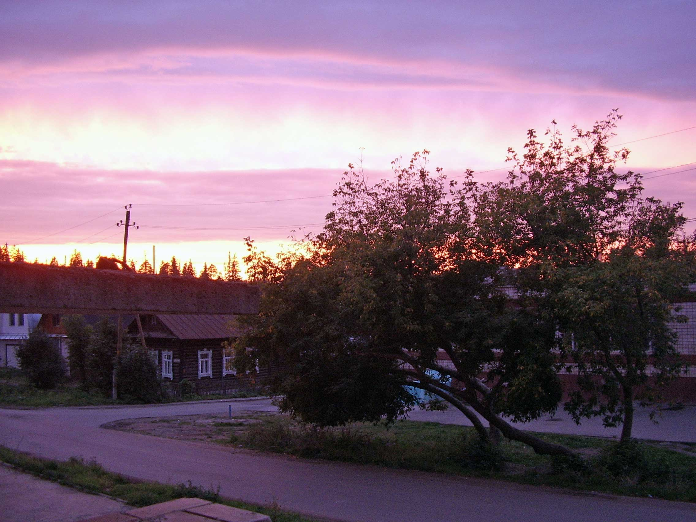 City Sarapul, Sedelnikov street